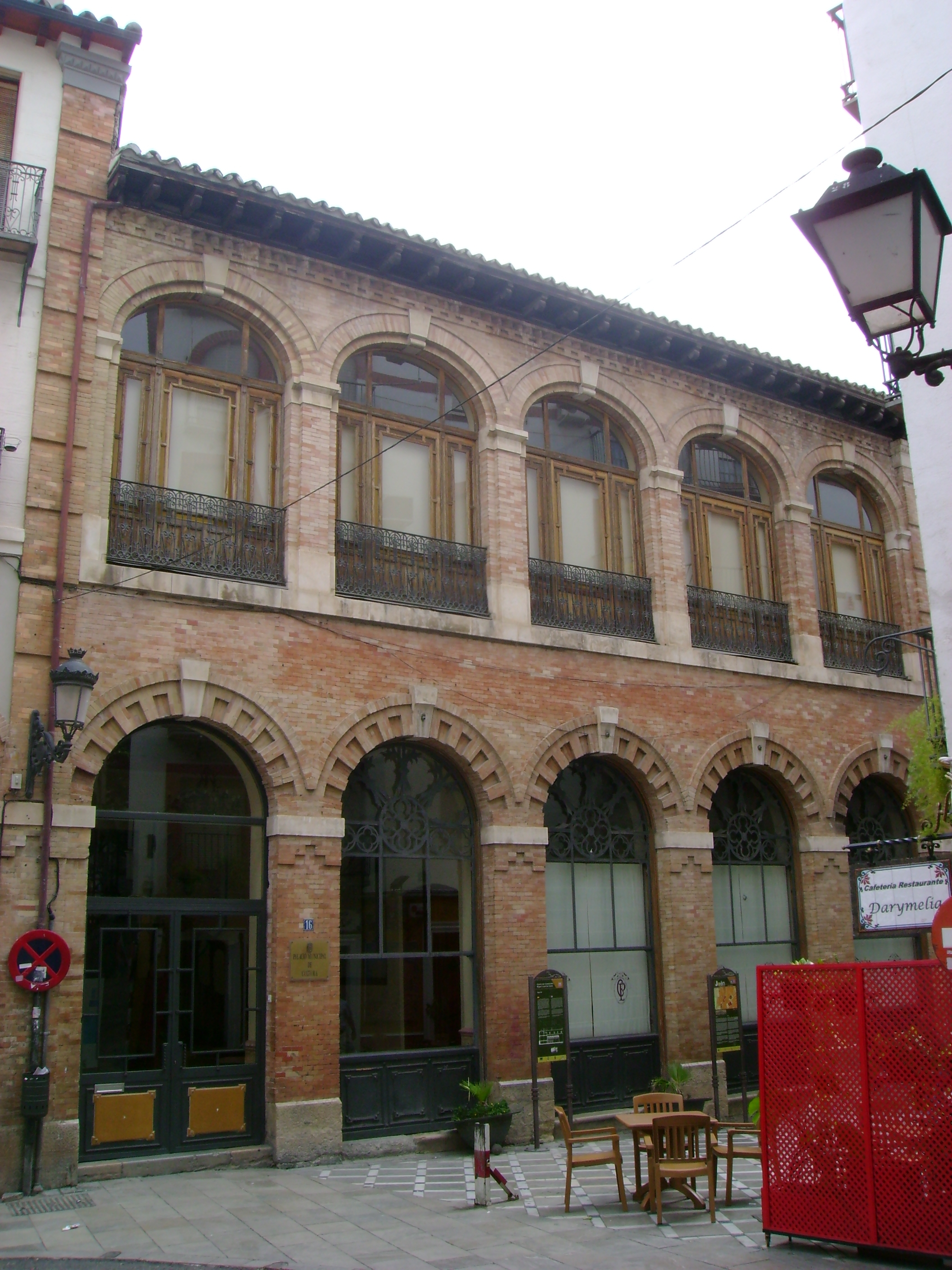 Fachada del Palacio del Condestable Iranzo de Jaén.